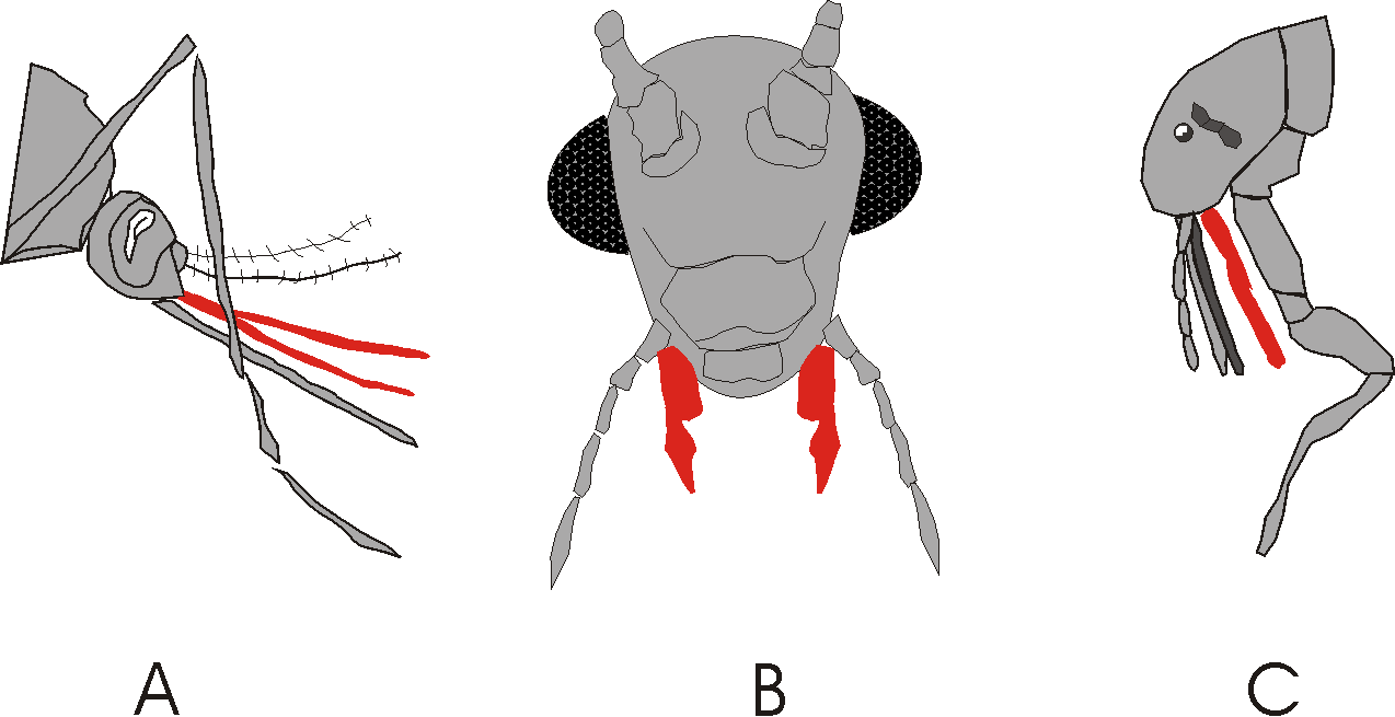 Schematische Darstellung des Palpus (Tastorgan) bei 3 Insekten